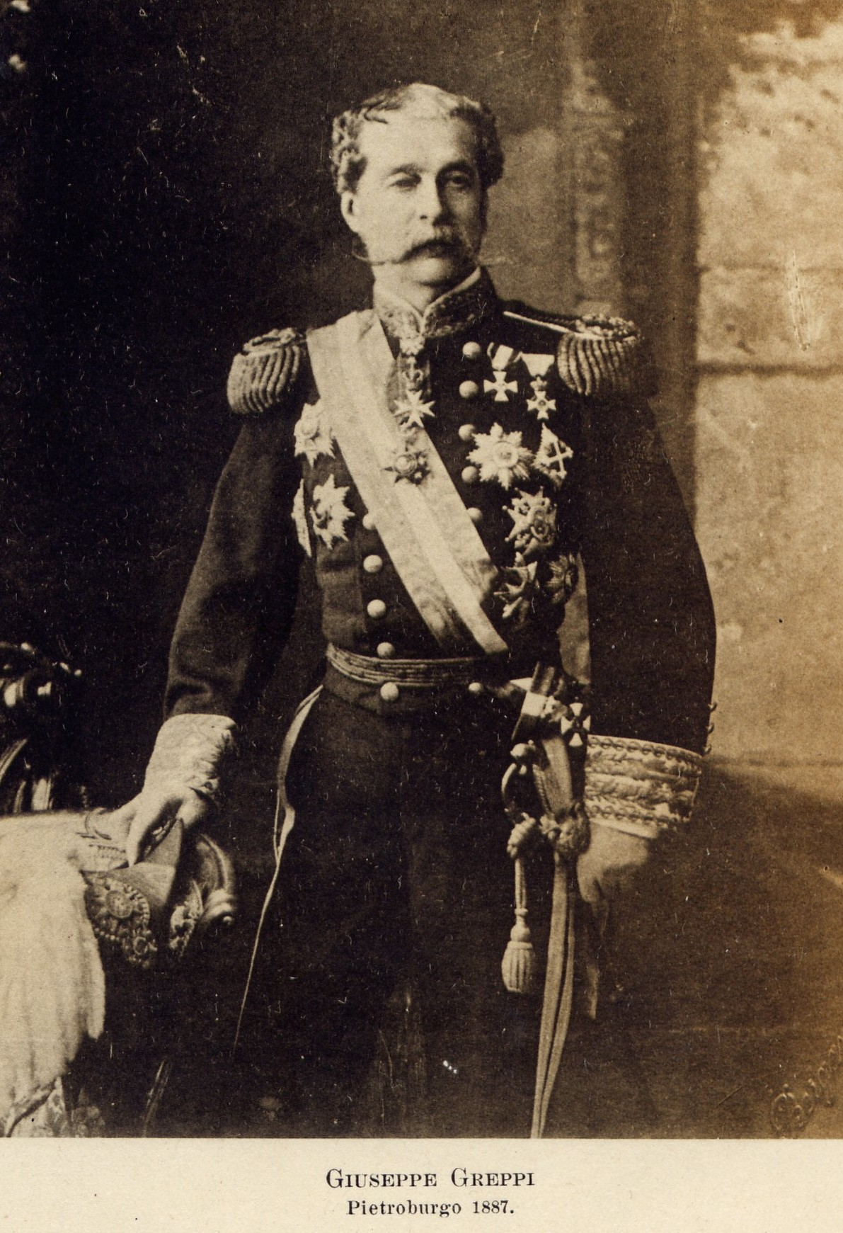 Giuseppe Greppi, senatore del Regno d'Italia, ambasciatore.